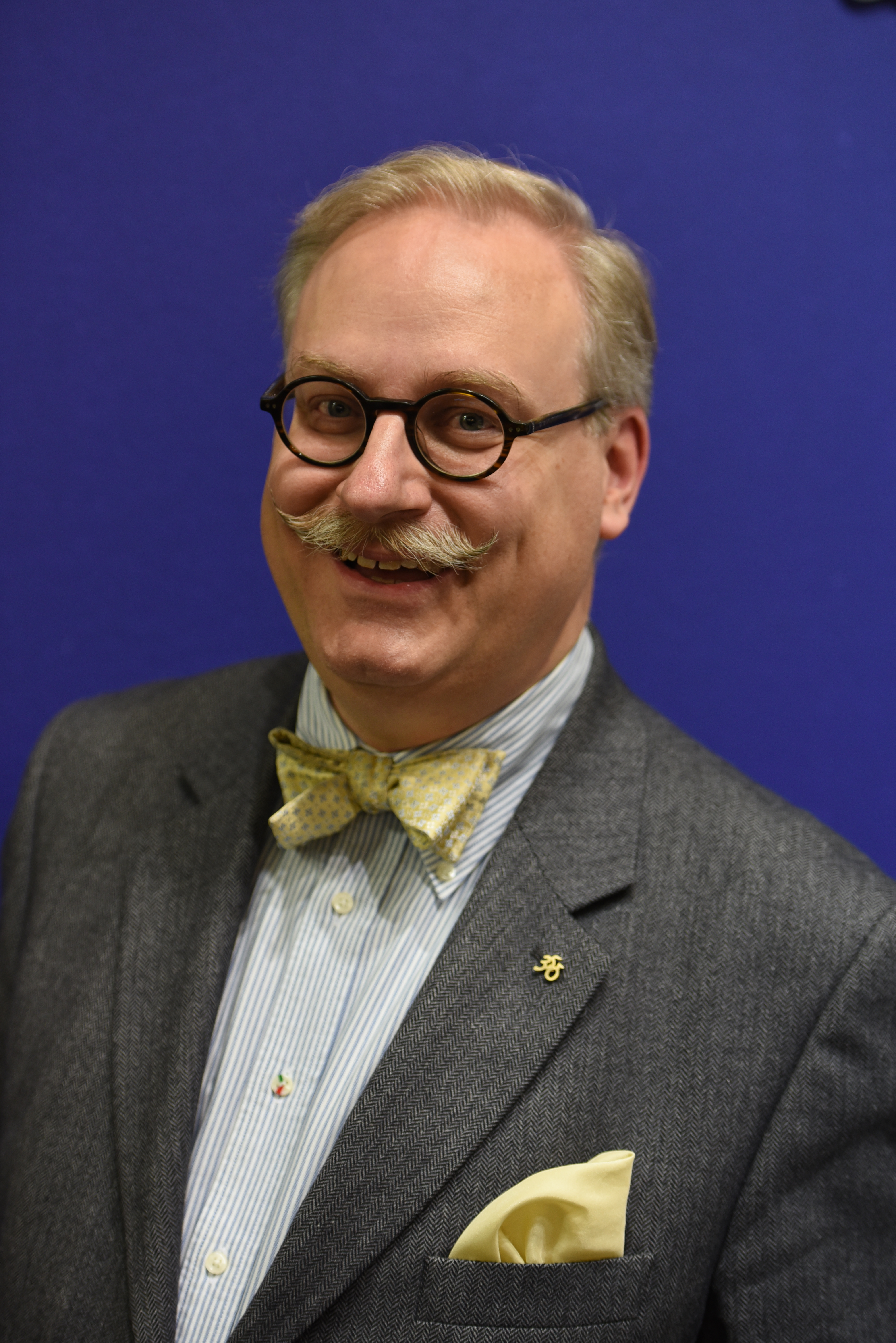 Fredrik Tersmeden, arkivarie, skribent och tidigare universitetslärare, även känd som studentprofil vid Lunds universitet, fotograferad vid Bokmässan i Göteborg 2017.